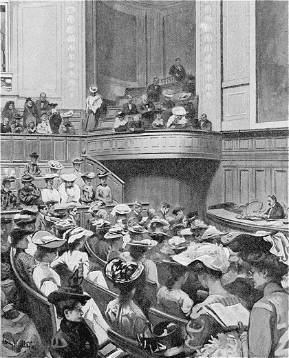 "L'amphithéâtre Richelieu, pendant un cours de M. Faguet."